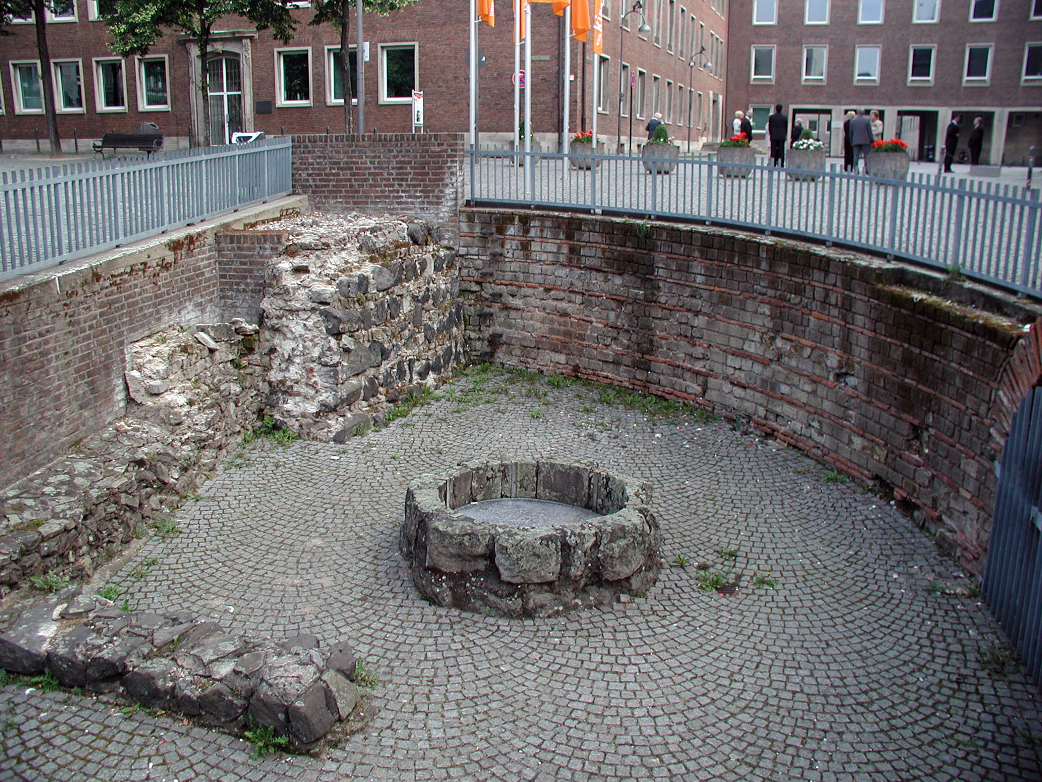 Köln-Rathausplatz, mittelalterlicher Brunnen (3. bis 9. Jahrh. n. Chr.)